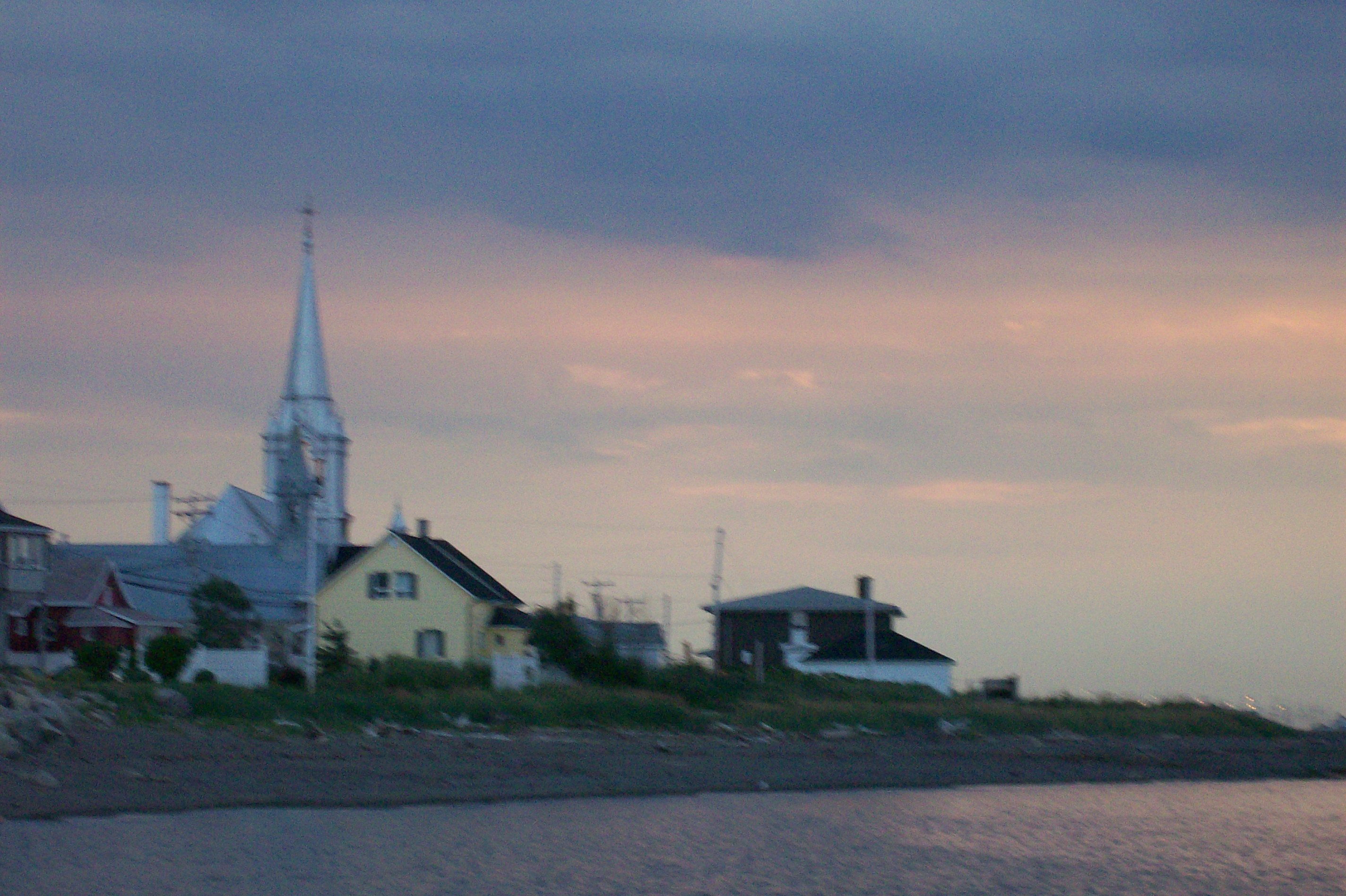 Photo de St-Ulric de Matane vue du bord de la mer, Québec, Canada